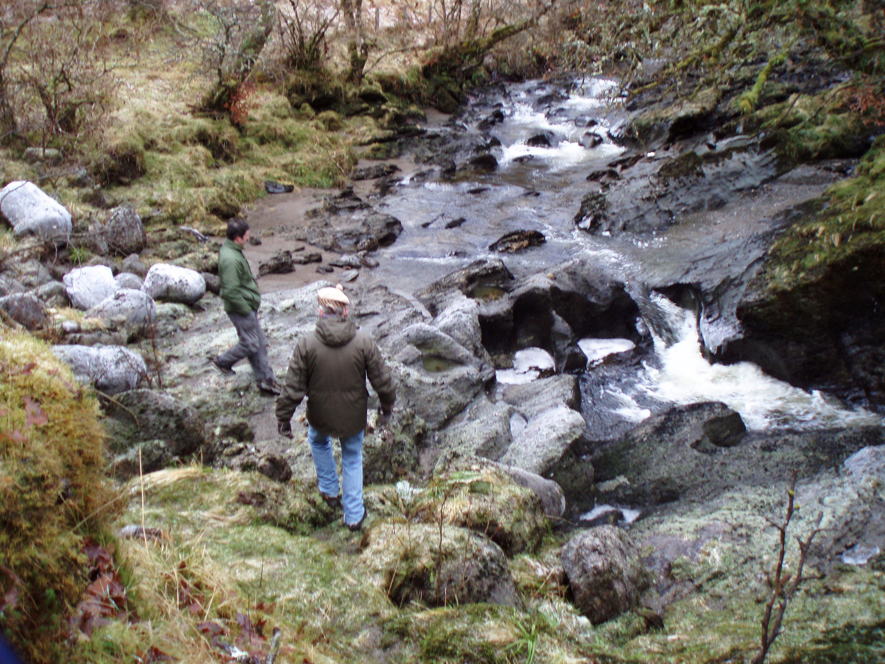 Abhainn Síra ann an Gleann Síra, faisg air Inbhir Aora, Earra-Ghaidheal